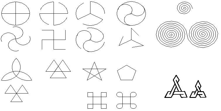 символы